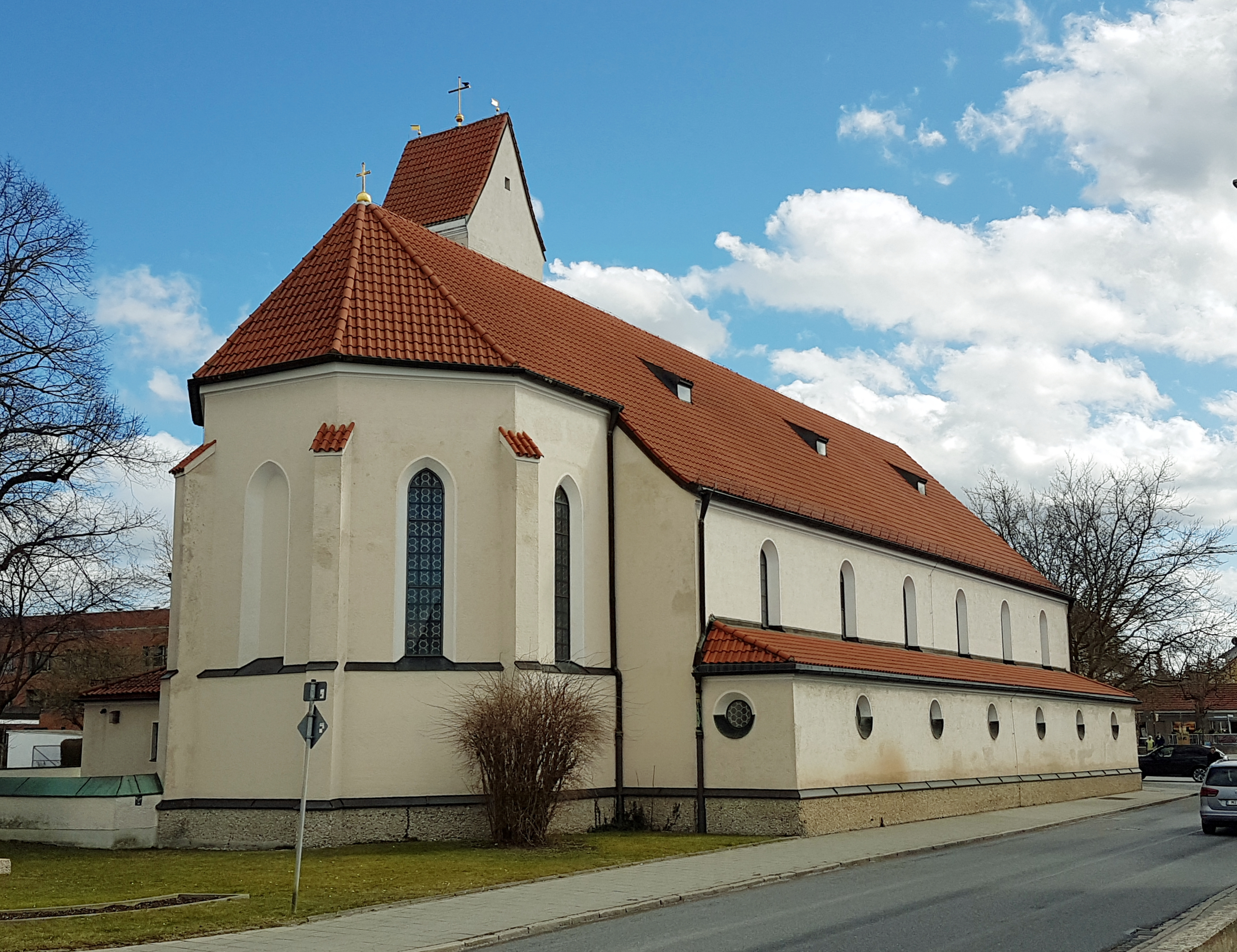 St. Jakob (Feldkirchen), Ansicht von Nordwesten